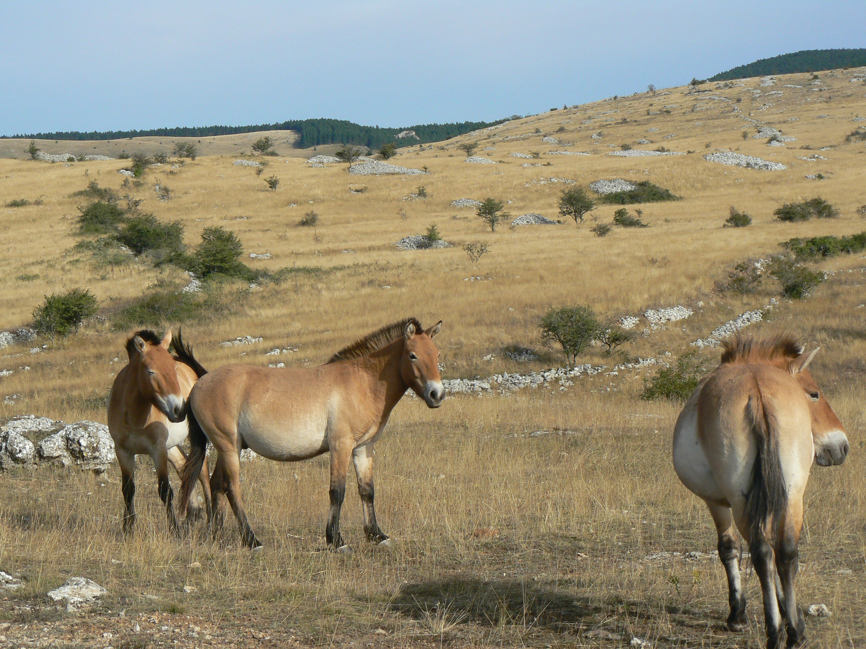 Chevaux de Przewalski sur le causse Méjean en Lozère